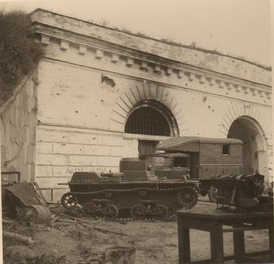 Брэсцкая крэпасць. Усходняя брама. 1941. Заблакаваная Камсамольцам брама